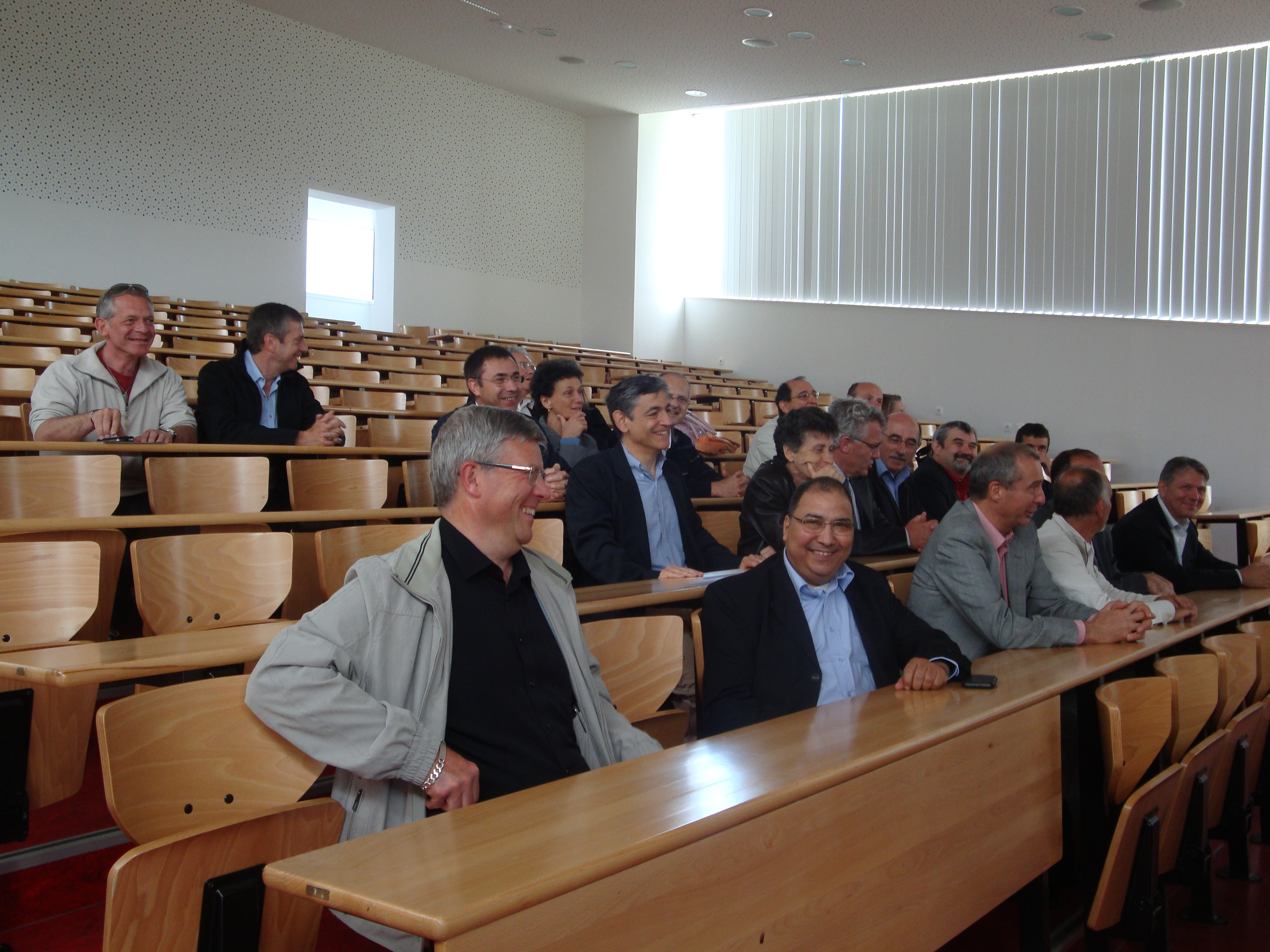 30 ans de la première promotion de l'ENSIMEV